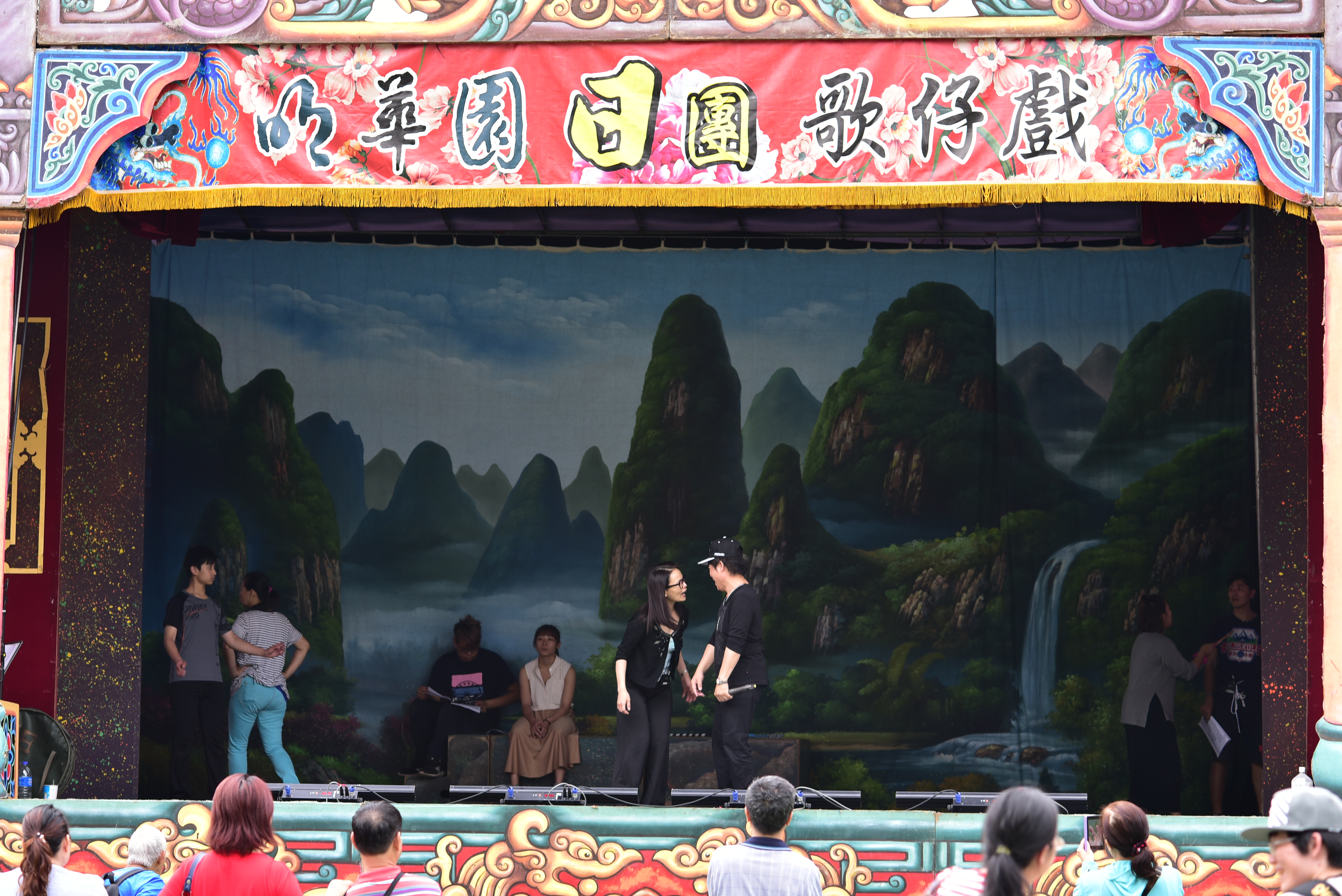 明華園彩排於國泰國小2018 GuoTai Elementary School, Xinzhuang District